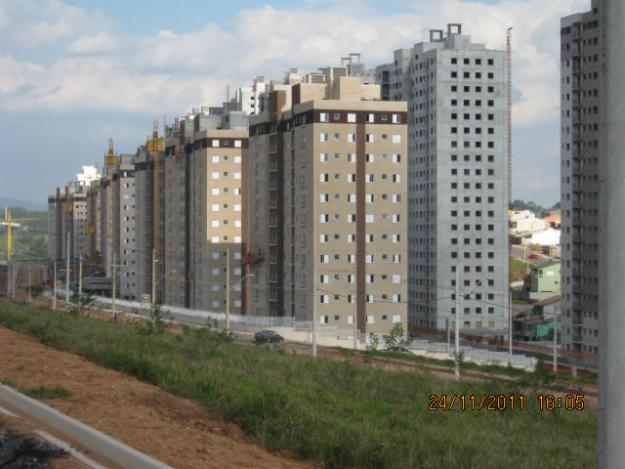 Bairro portal dos ypes em Cajamar, região oeste da grande SP. 2012